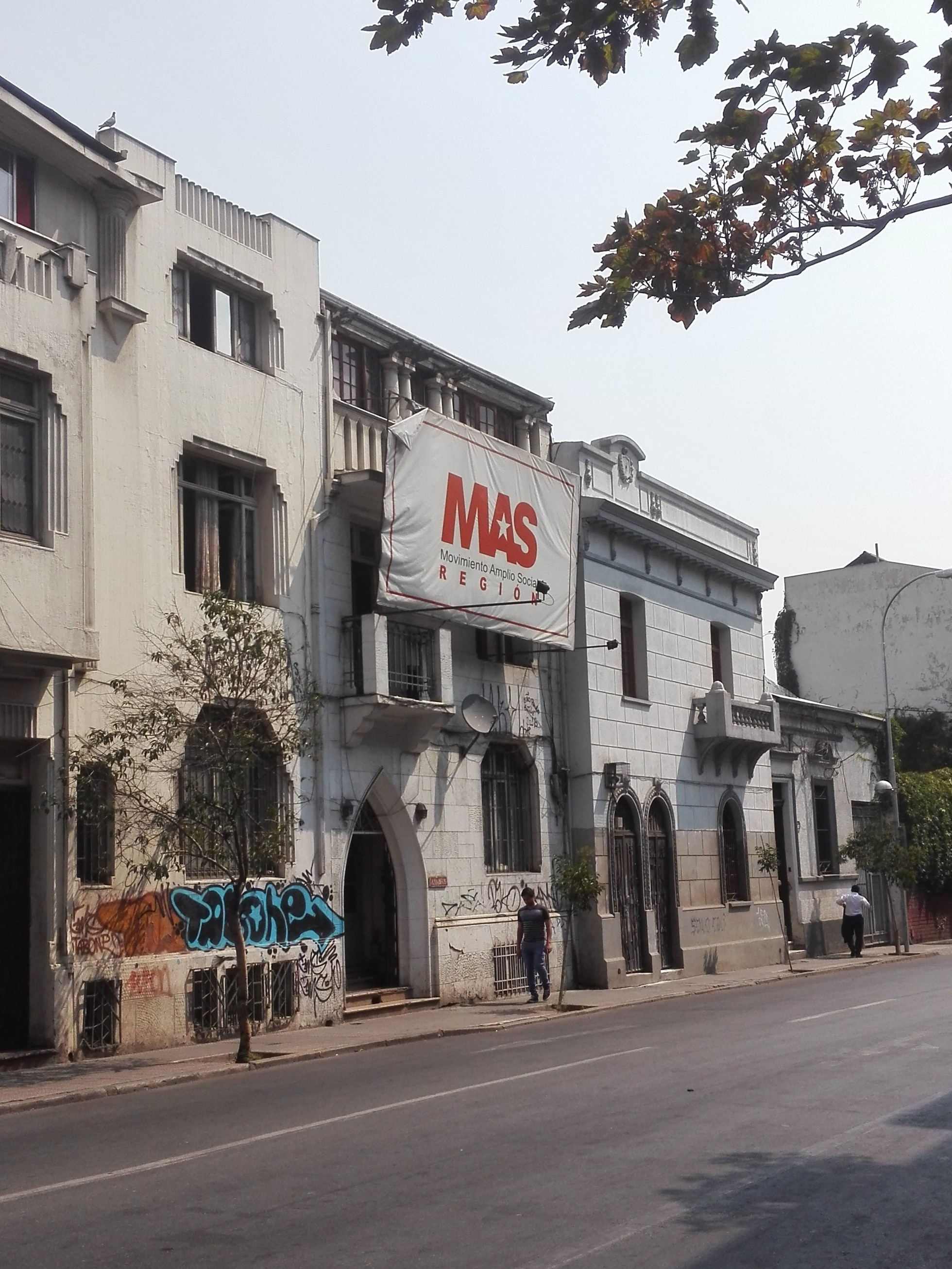 Sede MAS Región, partido político chileno, en Santiago de Chile.